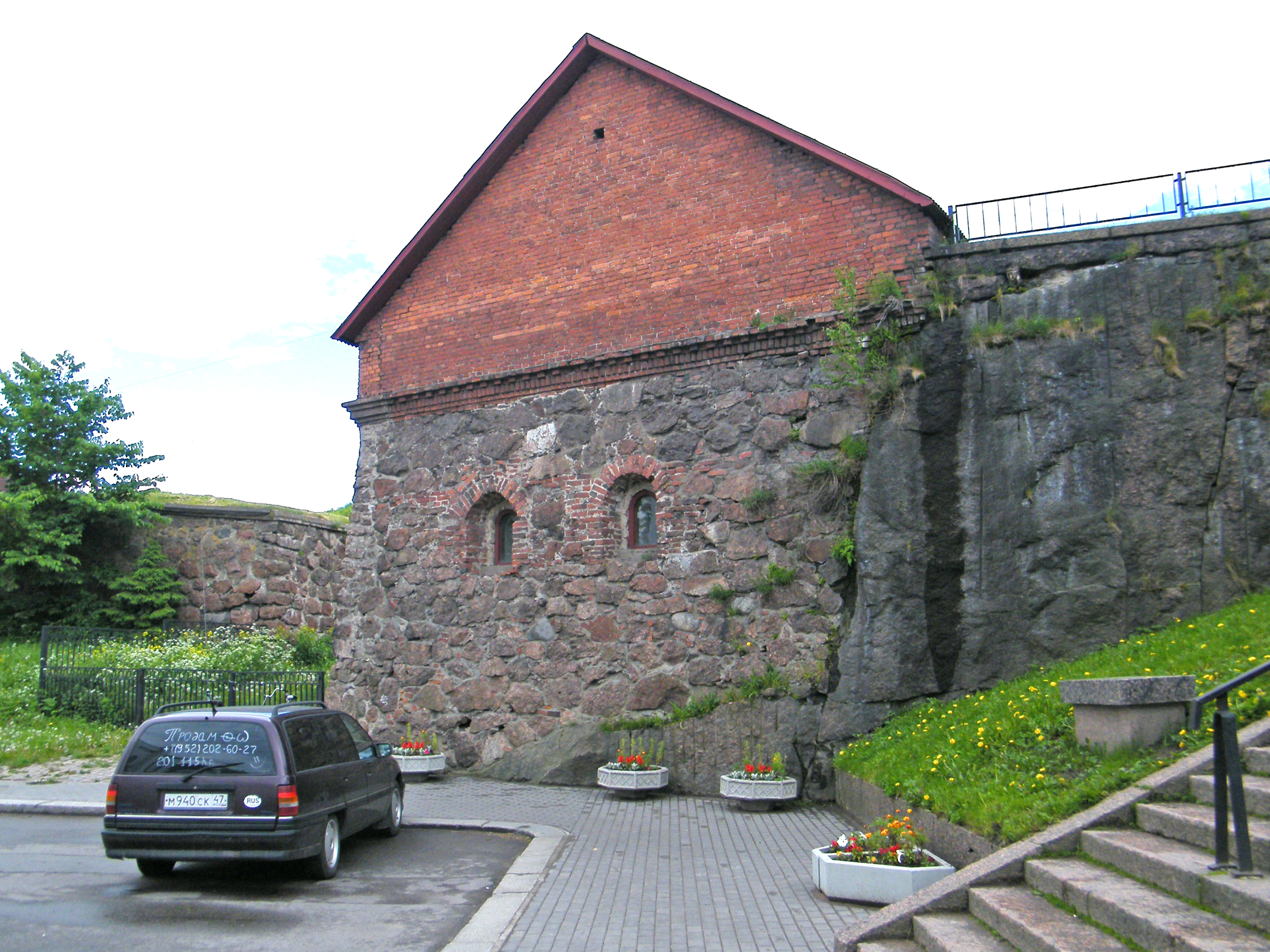 Пороховой погреб Рогатой крепости